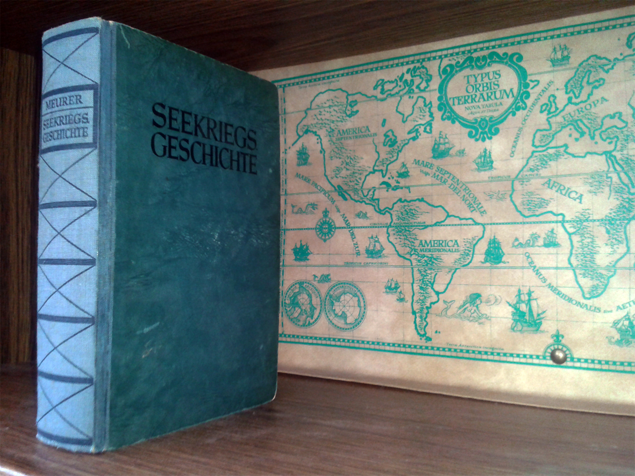 Seekriegsgeschichte in Umrissen - Seemacht und Seekriege, vornehmlich vom 16. Jahrhundert ab, von Alexander Meurer, Vizeadmiral a.D., Fünfte Auflage